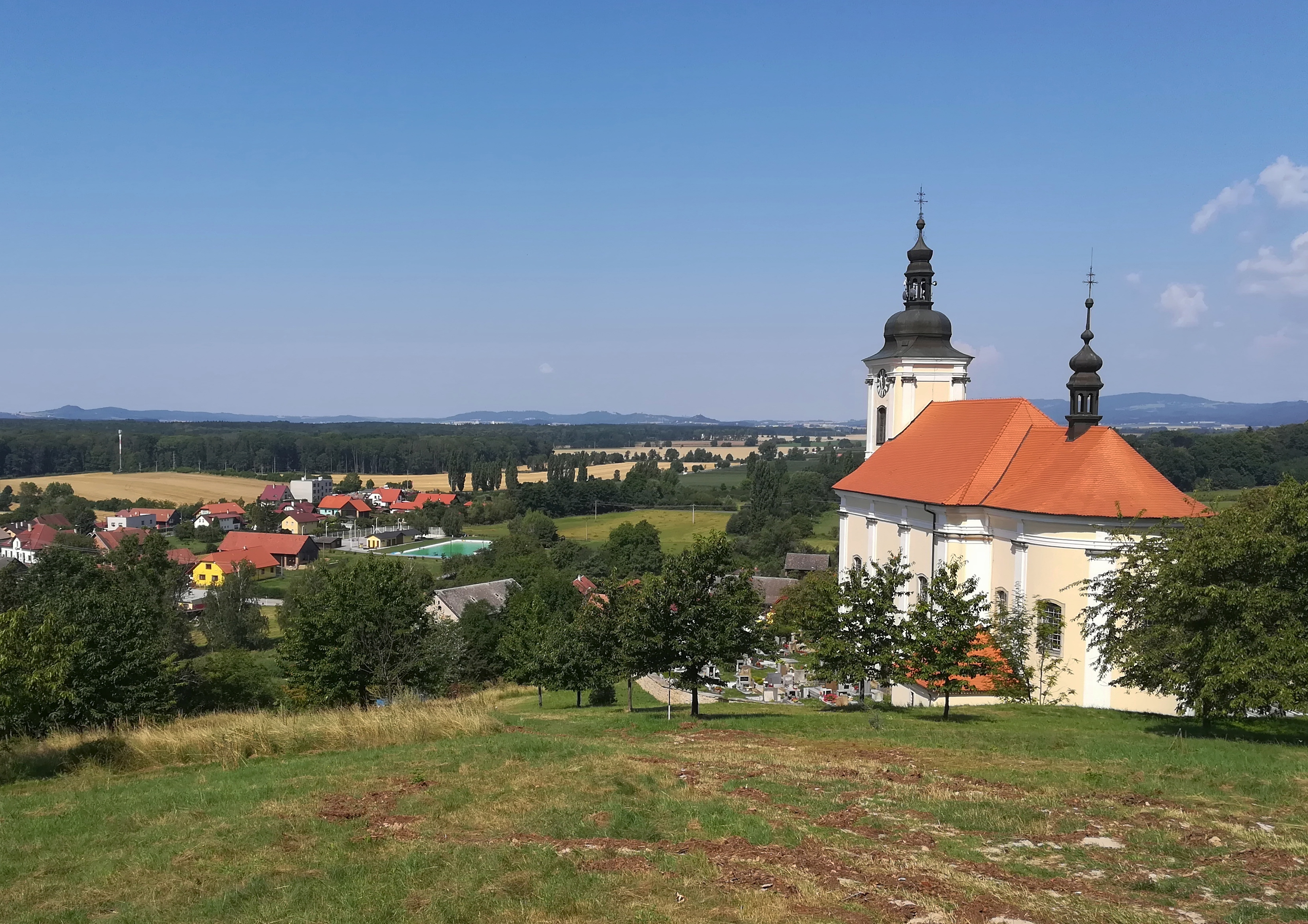 Konecchlumí - pohled od východu